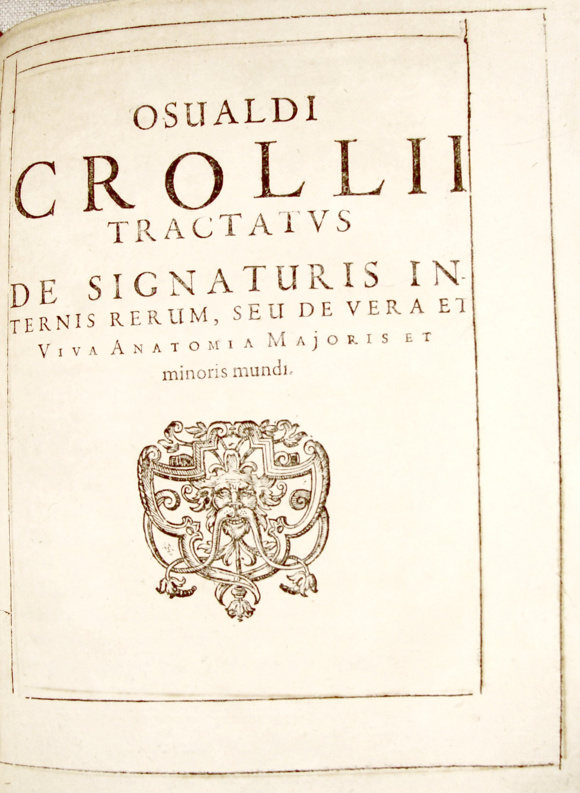 Strona tytułowa Tractatus de signaturis internis rerum, seu de vera et viva anatomia majoris et minoris mundi, II tom Basilica Chymica Osvaldusa Crolliusa